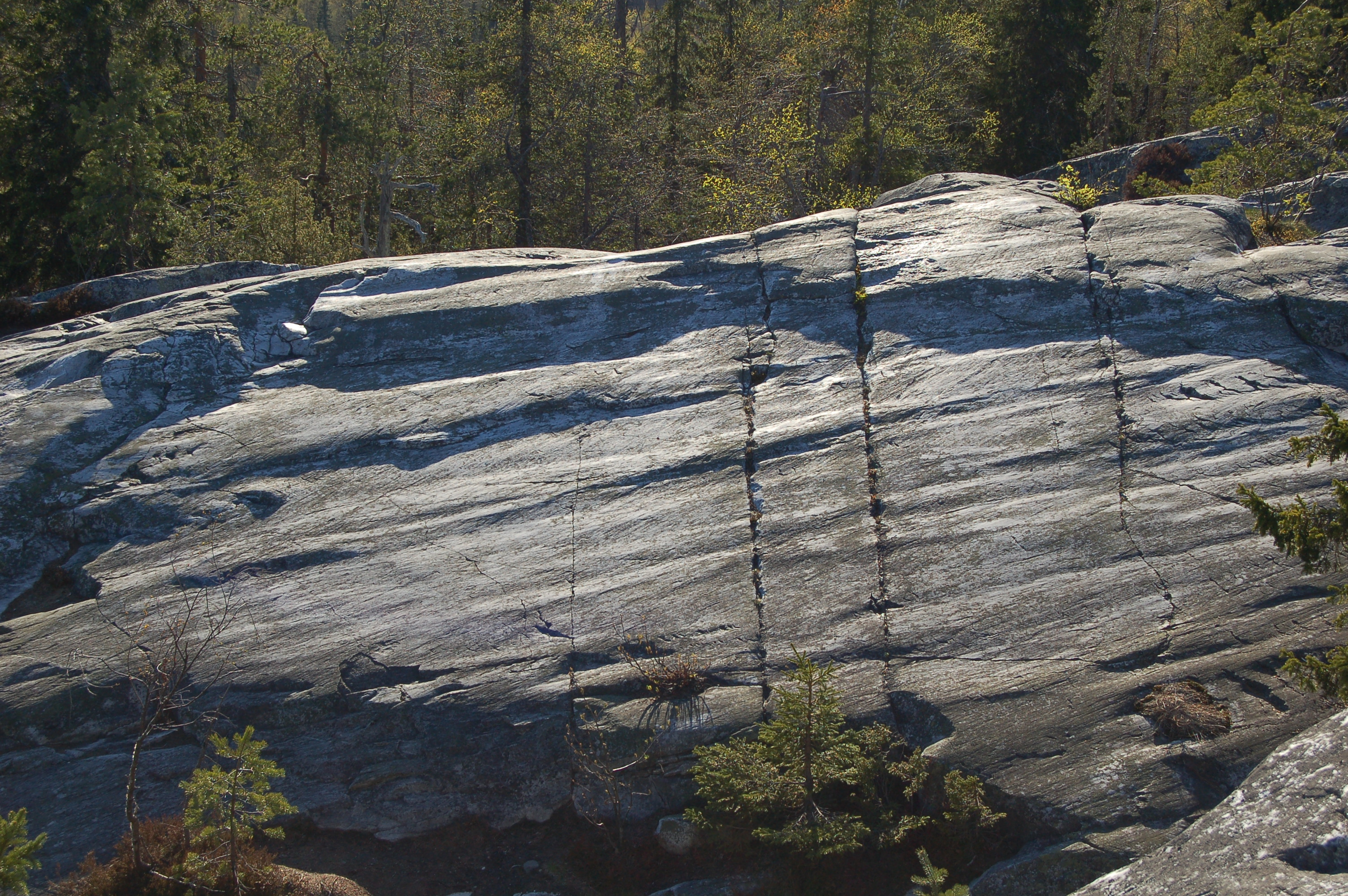 Akka-Koli in Koli National Park.